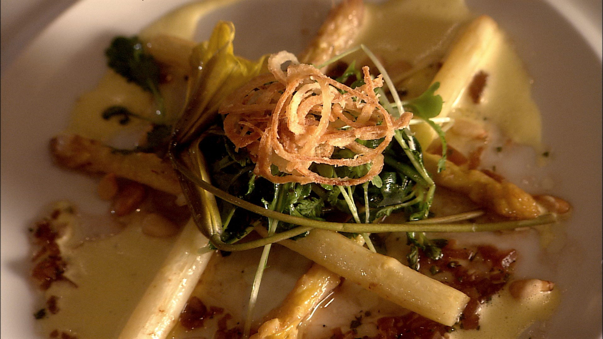 Gastronomie de Montréal / Gastronomy in Montreal, Québec (Restaurant Toqué!)